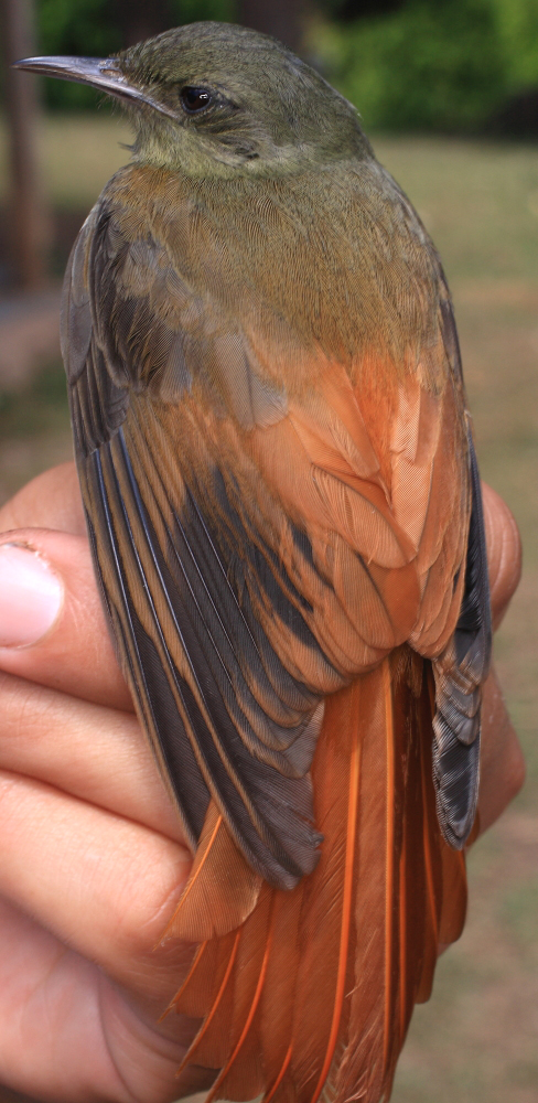 Sittasomus griseicapillus Birds of Serranía de Perijá of Colombia and Venezuela (Ornitologia Colombiana [2014] 14: 62–93)